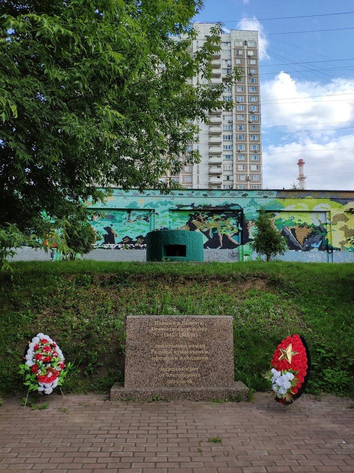 Мемориал погибшим кунцевчанам и солдатам и офицерам маршевых рот в Великой Отечественной войне 1941-1945 годов, расположенный на южном берегу Мазиловского пруда